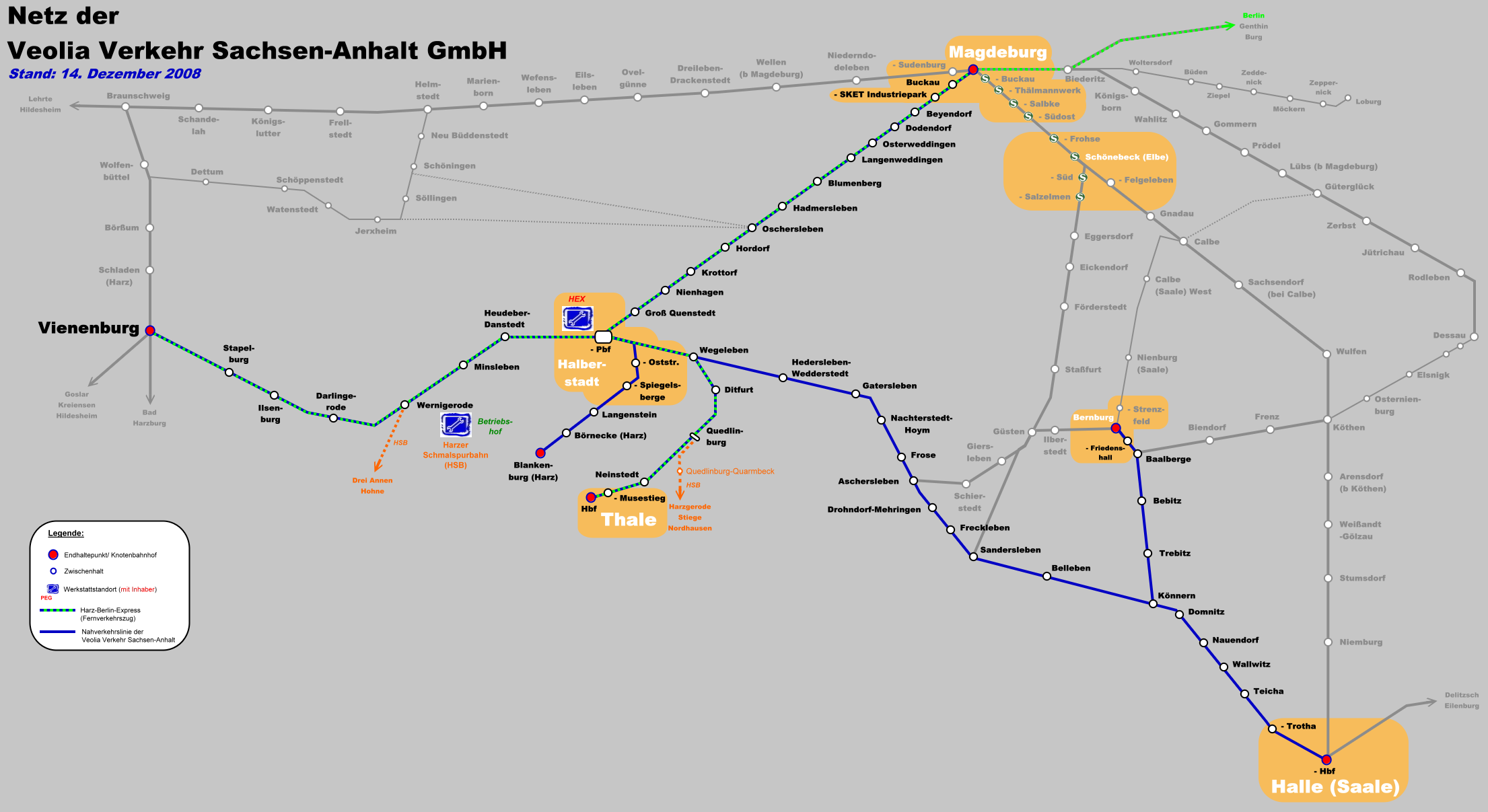 Netz der Veolia Verkehr Sachsen-Anhalt